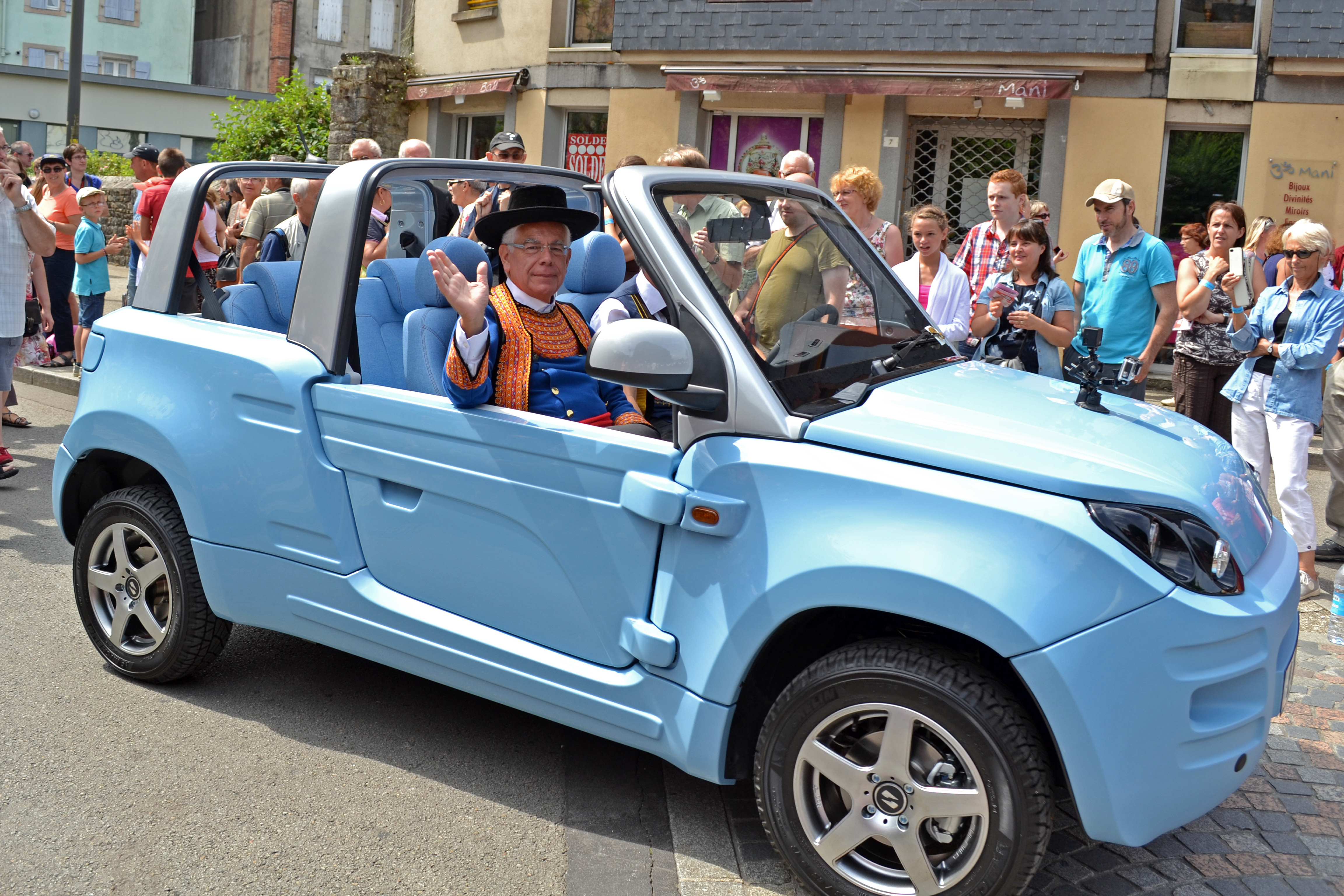 Fermeture du cortège par la Blue Summer, voiture électrique du groupe Bolloré, avec à son bord Pierre Maille, Président du Conseil général du Finistère, lors du festival de Cornouaille 2014 le dimanche 27 juillet pour Kemper en Fête dans les rues de Quimper.